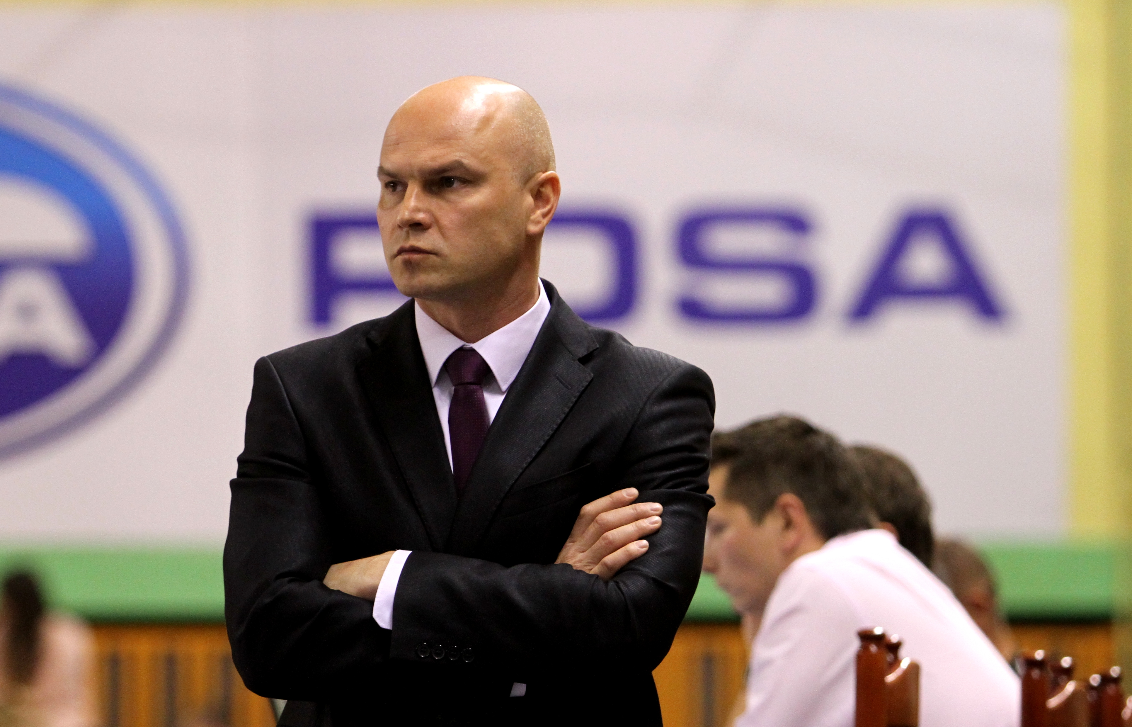 Wojciech Kamiński Rosa Radom